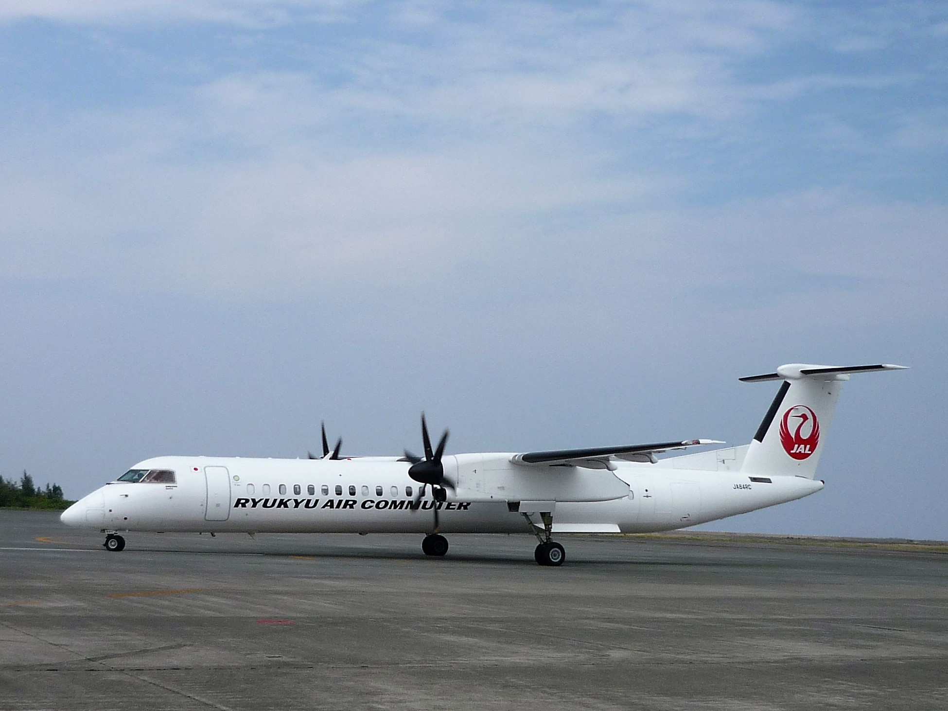 奄美空港の琉球エアーコミューター機 Panasonic Lumix DMC-FS3